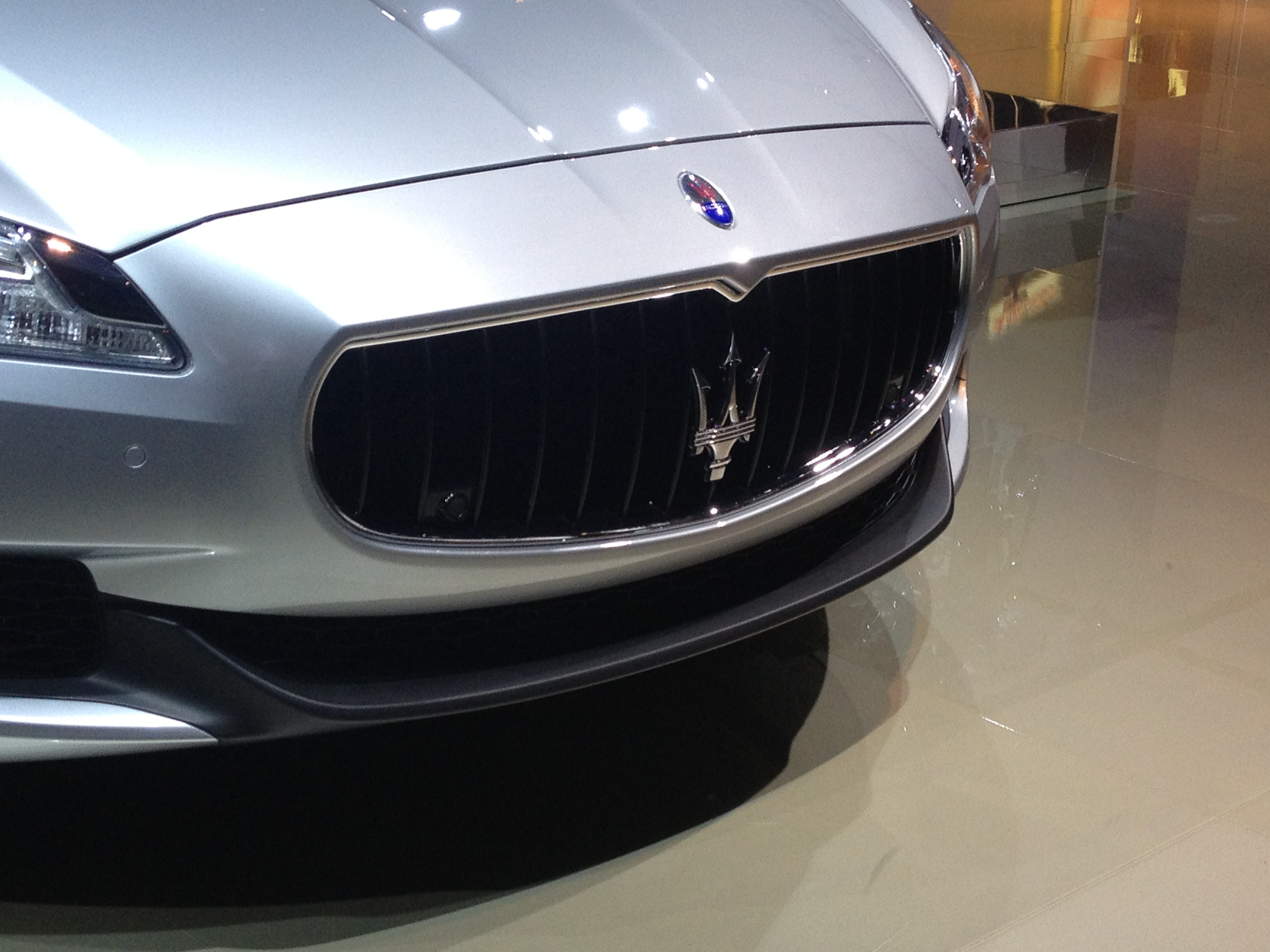 it: Una Maserati Quattroporte VI (2013) al Salone dell'automobile di Detroit (2013) en: Maserati Quattroporte VI: 2013 North American International Auto Show Detroit, Michigan